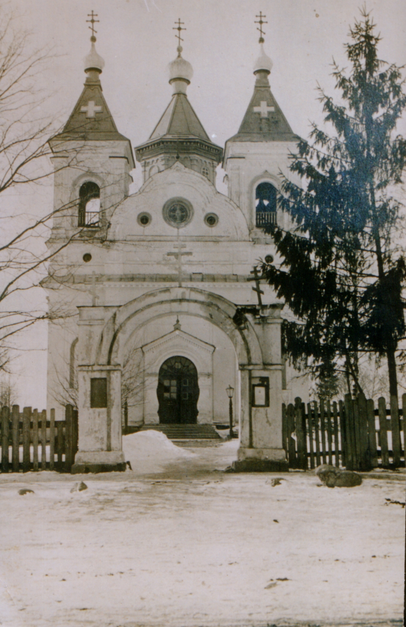 Беларуская (тарашкевіца): Вялейка (Vialejka), вуліца Асіпаўская (vulica Asipaŭskaja). Стары касьцёл па маскоўскай перабудове пад Юраўскую царкву